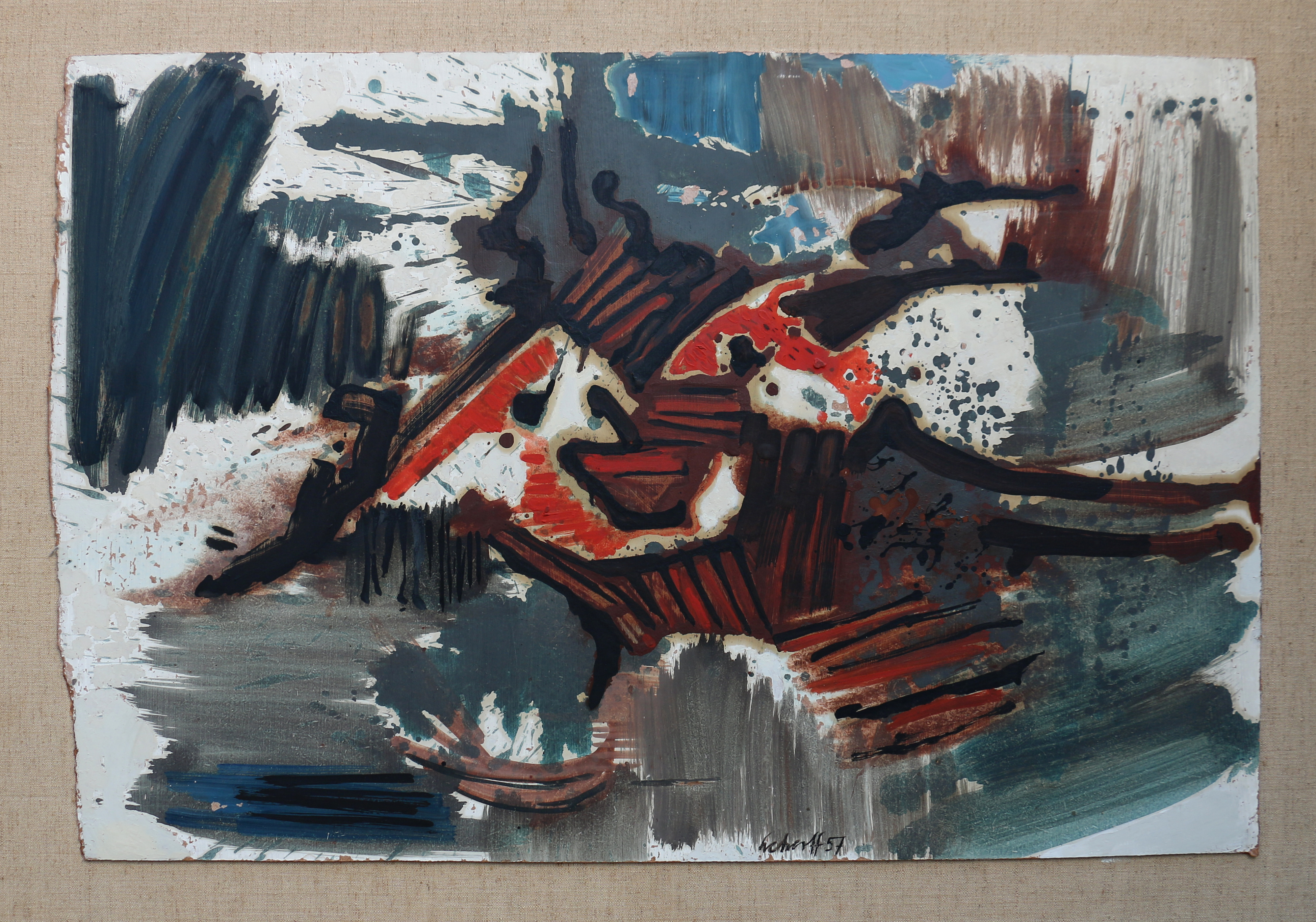 Öl auf Hartfaserplatte